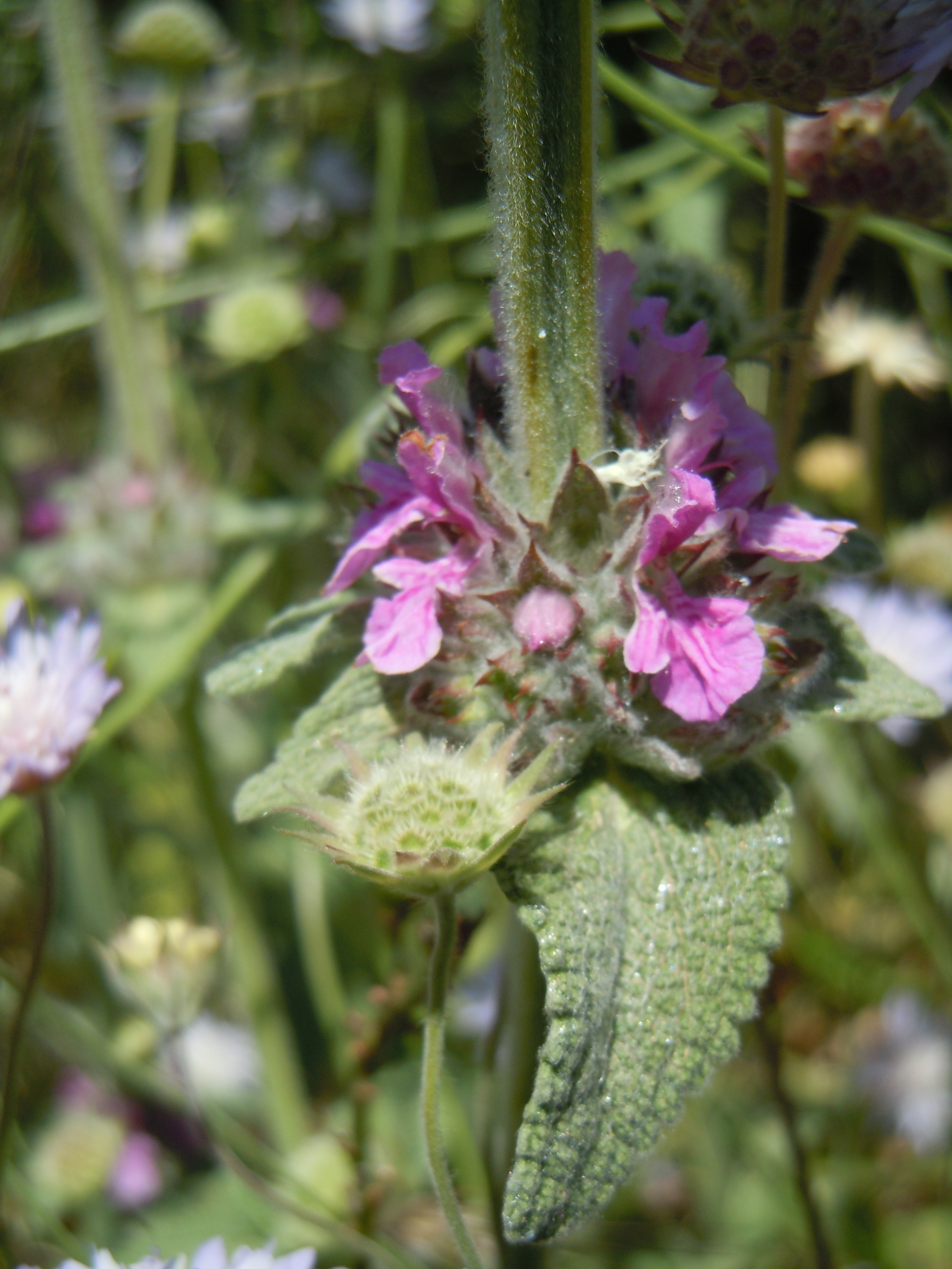 Stachys graeca à Mycènes